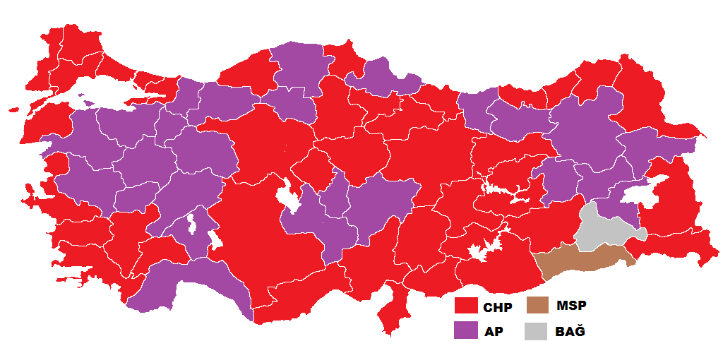 1977 genel seçimleri sonuçlarının Türkiye haritasında gösterimi.